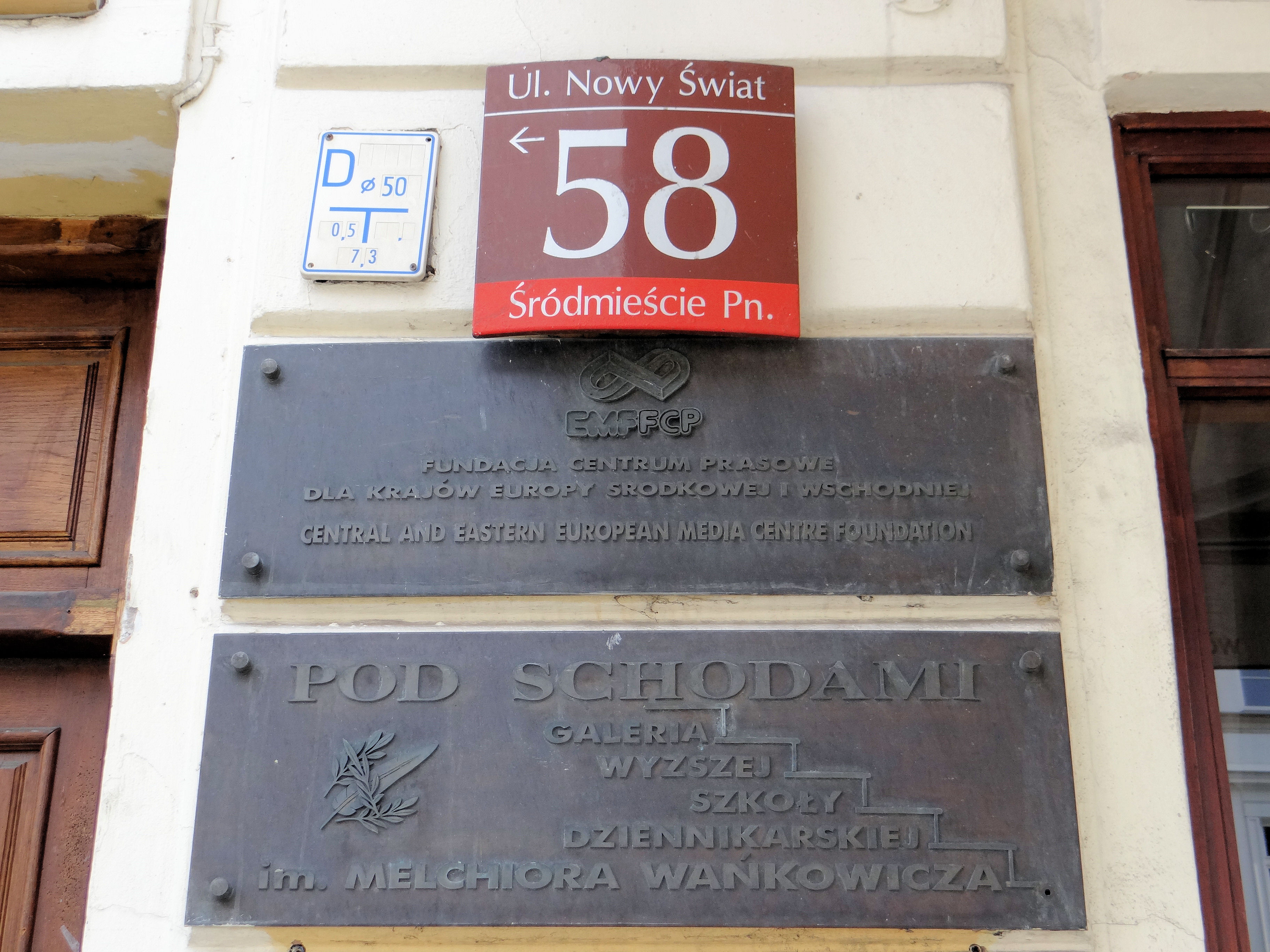 Dawny Hotel Savoy - obecnie Wydział Dziennikarstwa UW przy ul Nowy Świat 58 w Warszawie